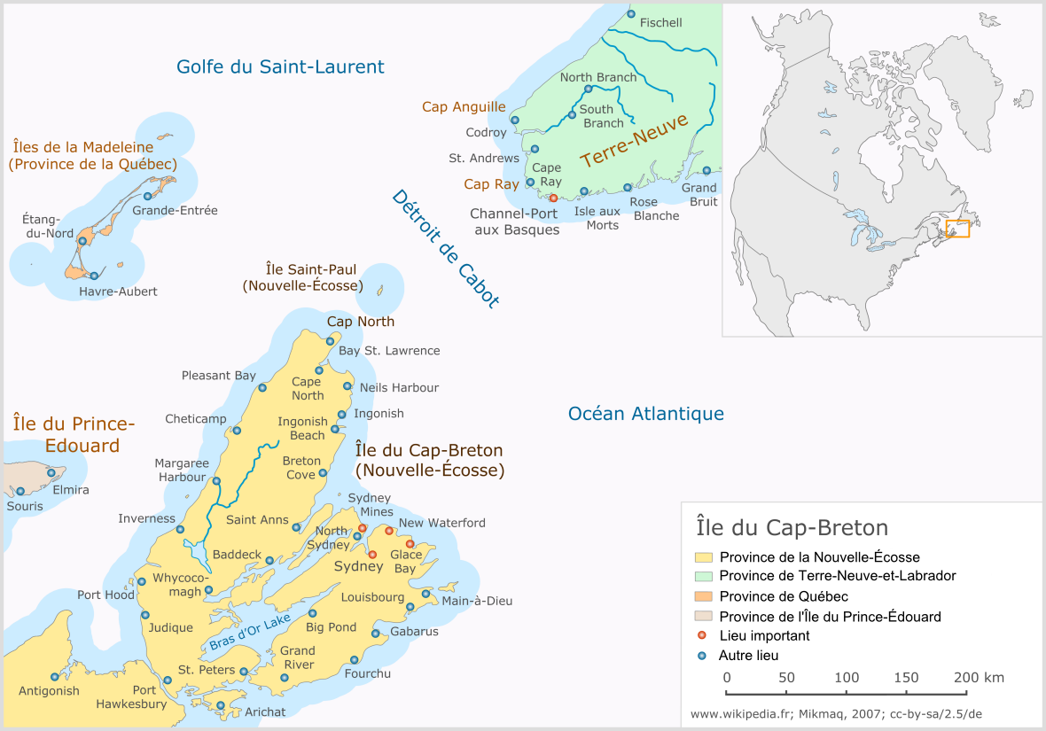 Île du Cap-Breton